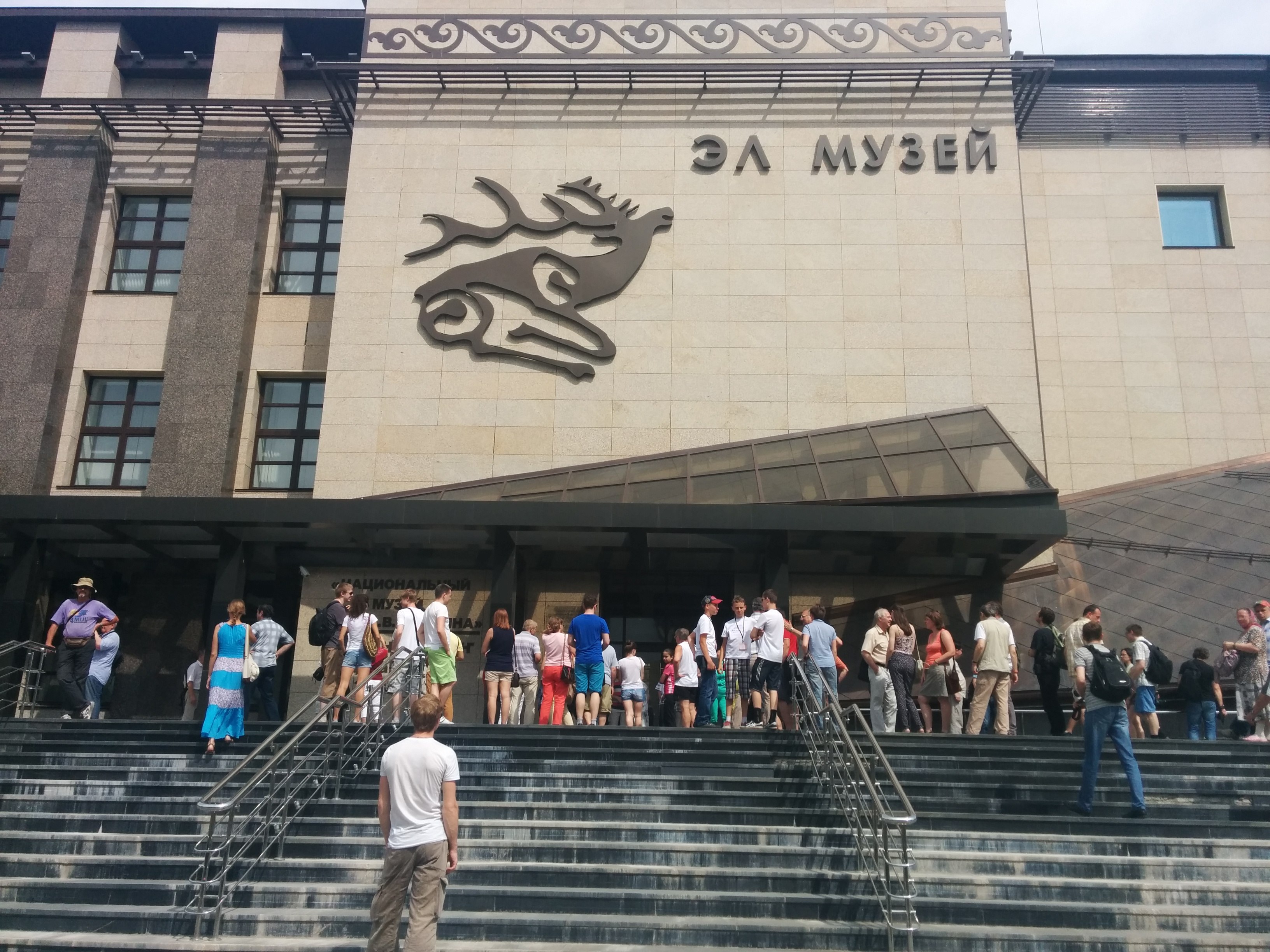 Тыва дыл: Алтай Республиканың Чоннуң музейи